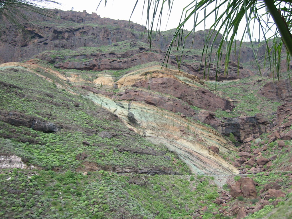 The Fuente de los Azulejos rock formation, Gran Canaria.